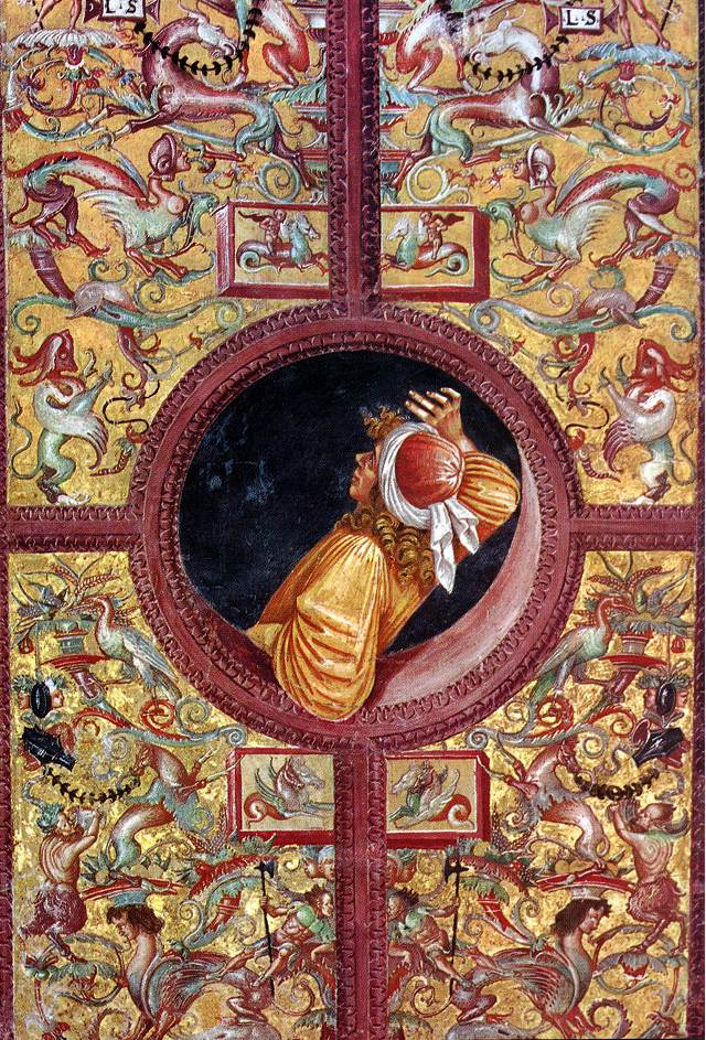 Poets: Empedocles